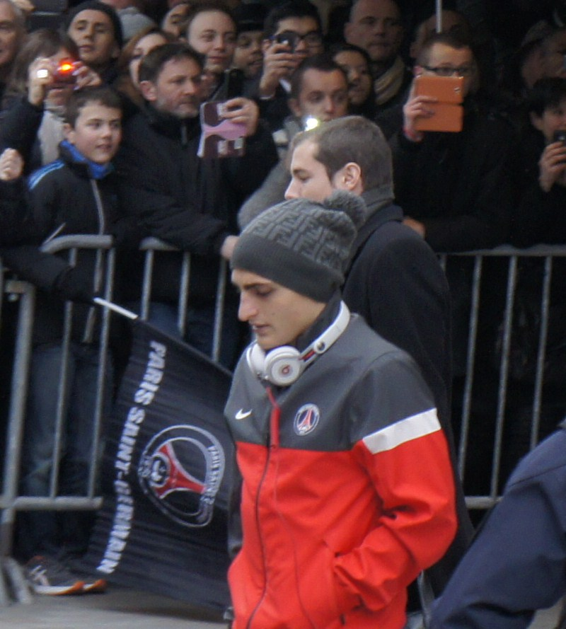 Les joueurs du PSG en déplacment à Reims sortent de leur hôtel .